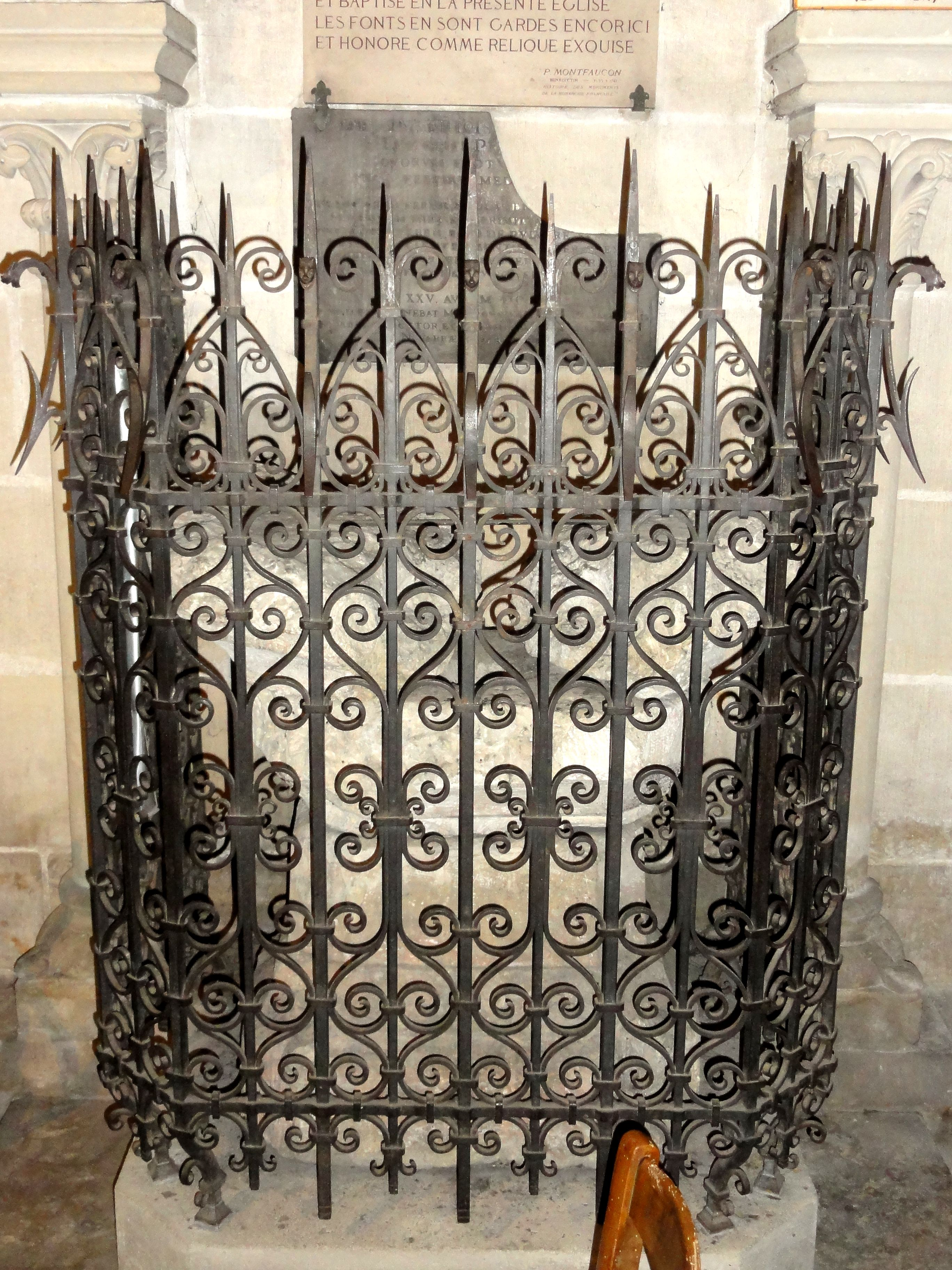 Fonts baptismaux ayant servi au baptême de saint Louis.